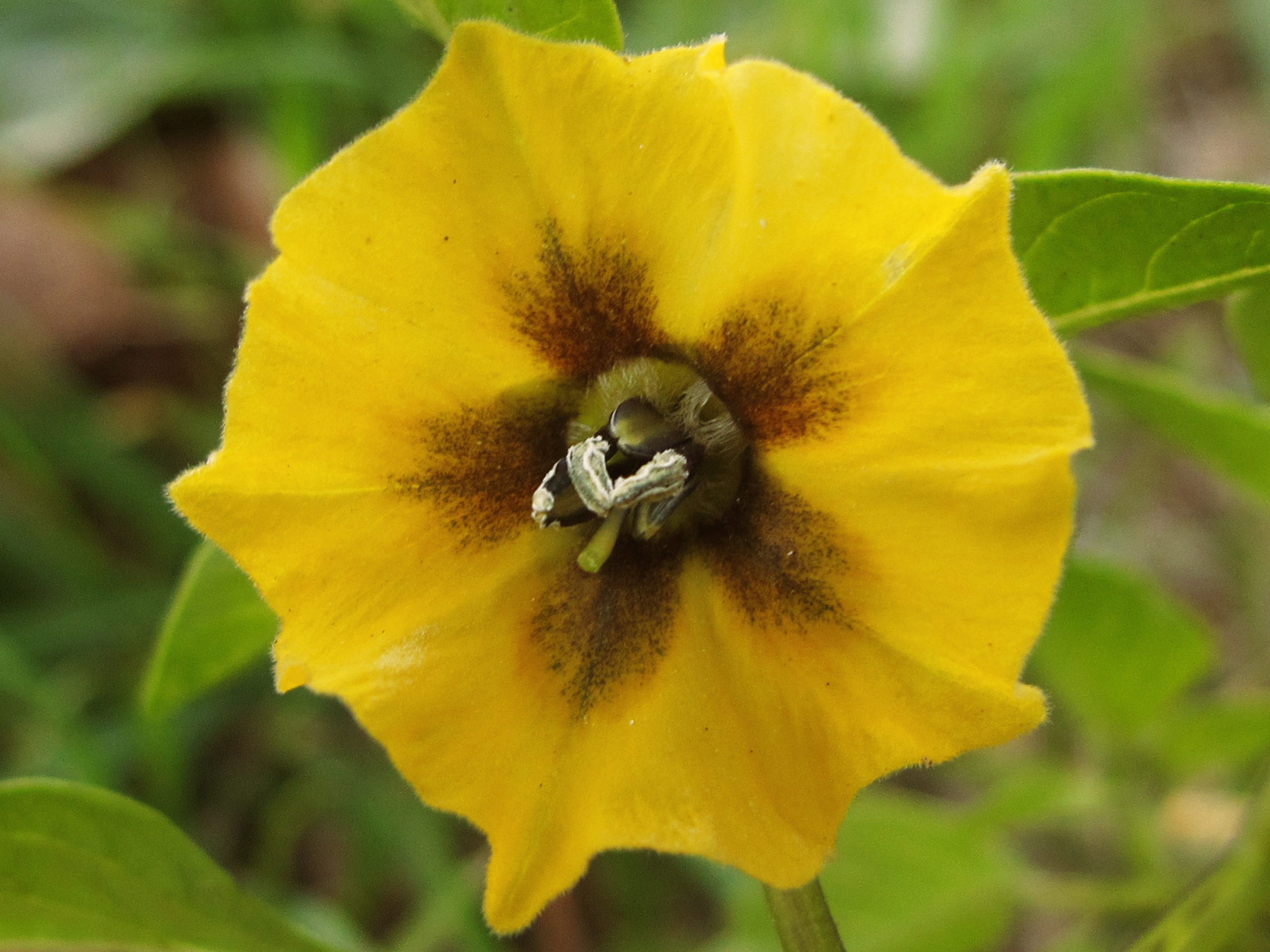 Hierba 80-100 cm de altura, con tallos erectos, Hojas ovadas, de 4 a 10 cm, con dentado de forma irregular Flores de 0,80 a 2,3 cm de diámetro, de color amarillo con manchas de color en el centro muy variables y anteras azuladas. Crece en areas con humedad y la planta es nativa de Mejico.